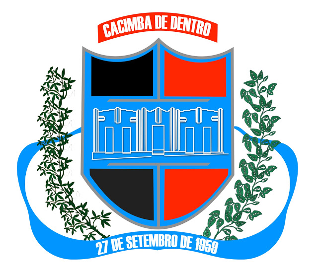 Brasão do município de Cacimba de Dentro na Paraíba